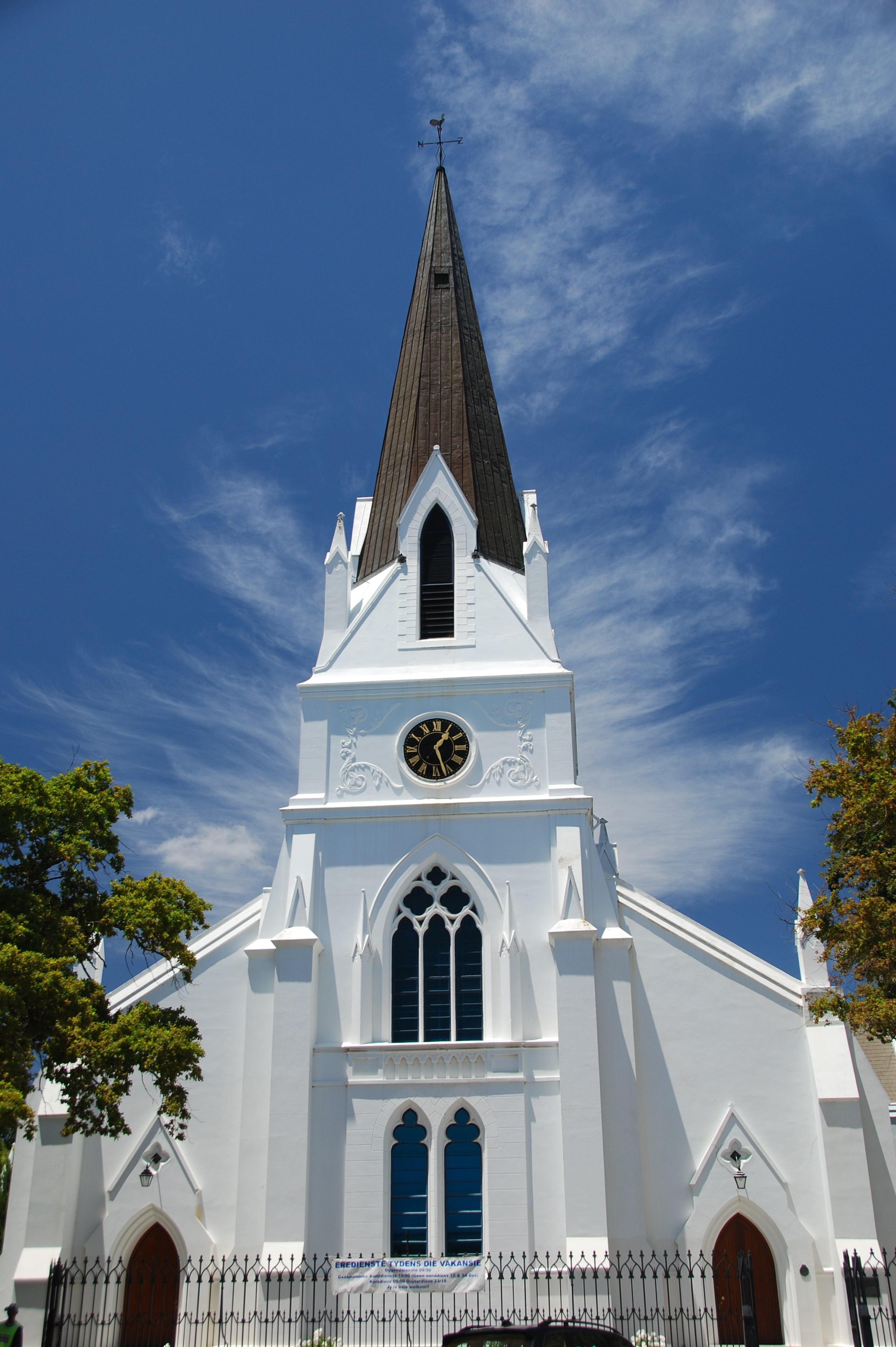 Stellenbosch: Voorkant van die Gotiese styl NG Moedergemeente aan die punt van Kerkstraat